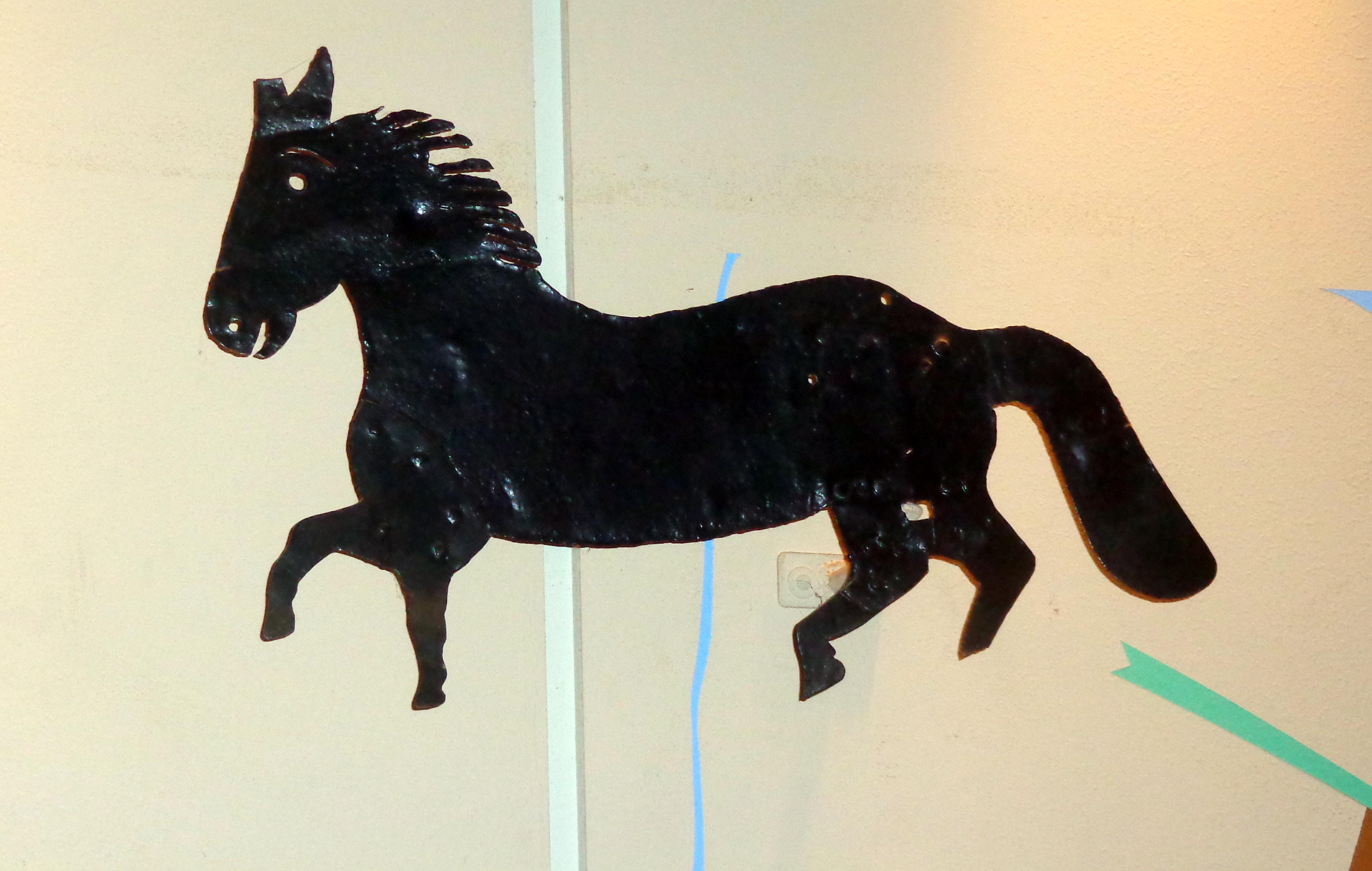 Esta es la veleta original que dio el nombre al barrio de Caballito. Se encuentra en el Museo de Luján, provincia de Buenos Aires, Argentina.